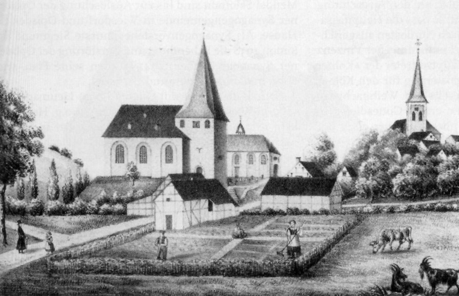 Alte (erbaut 1683-1686) und neue (rechts, erbaut 1844-1847) St.-Maurinus-Kirche in Lützenkirchen (jetzt Leverkusen) um 1845. Rechts hinter der alten Kirche ist die Annakapelle zu sehen.